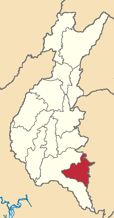 Mapa localizador del cantón en Los Ríos, Ecuador